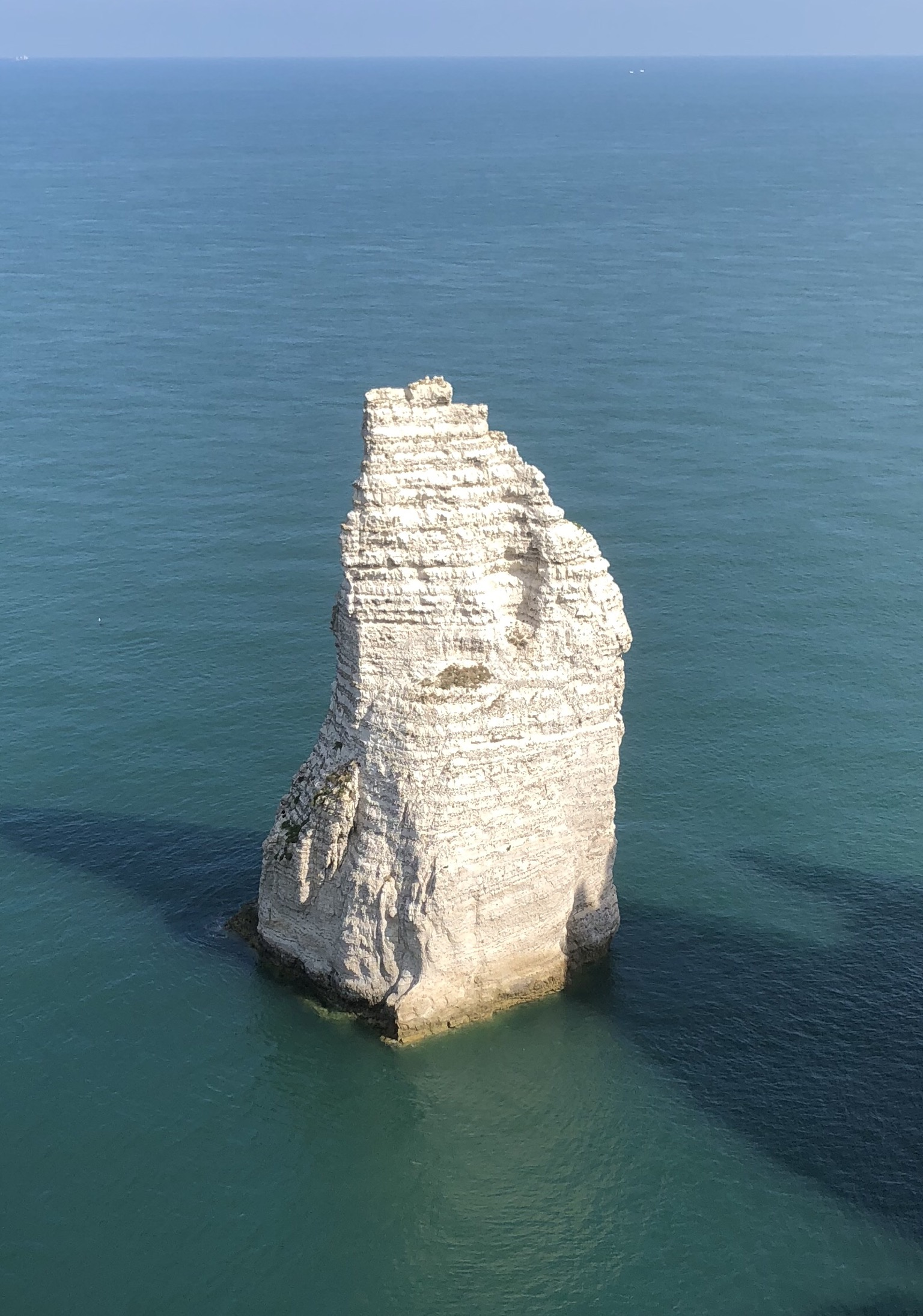 Felsnadel bei Etretat